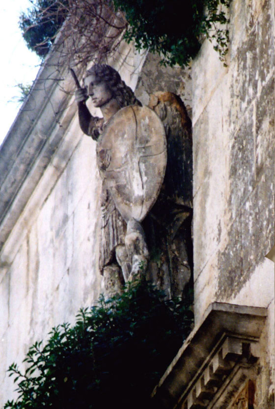 Statua di San Michele, protettore della famiglia Vulpano, sul finestrone centrale del palazzo omonimo. Scultura del palazzo Sylos-Vulpano.